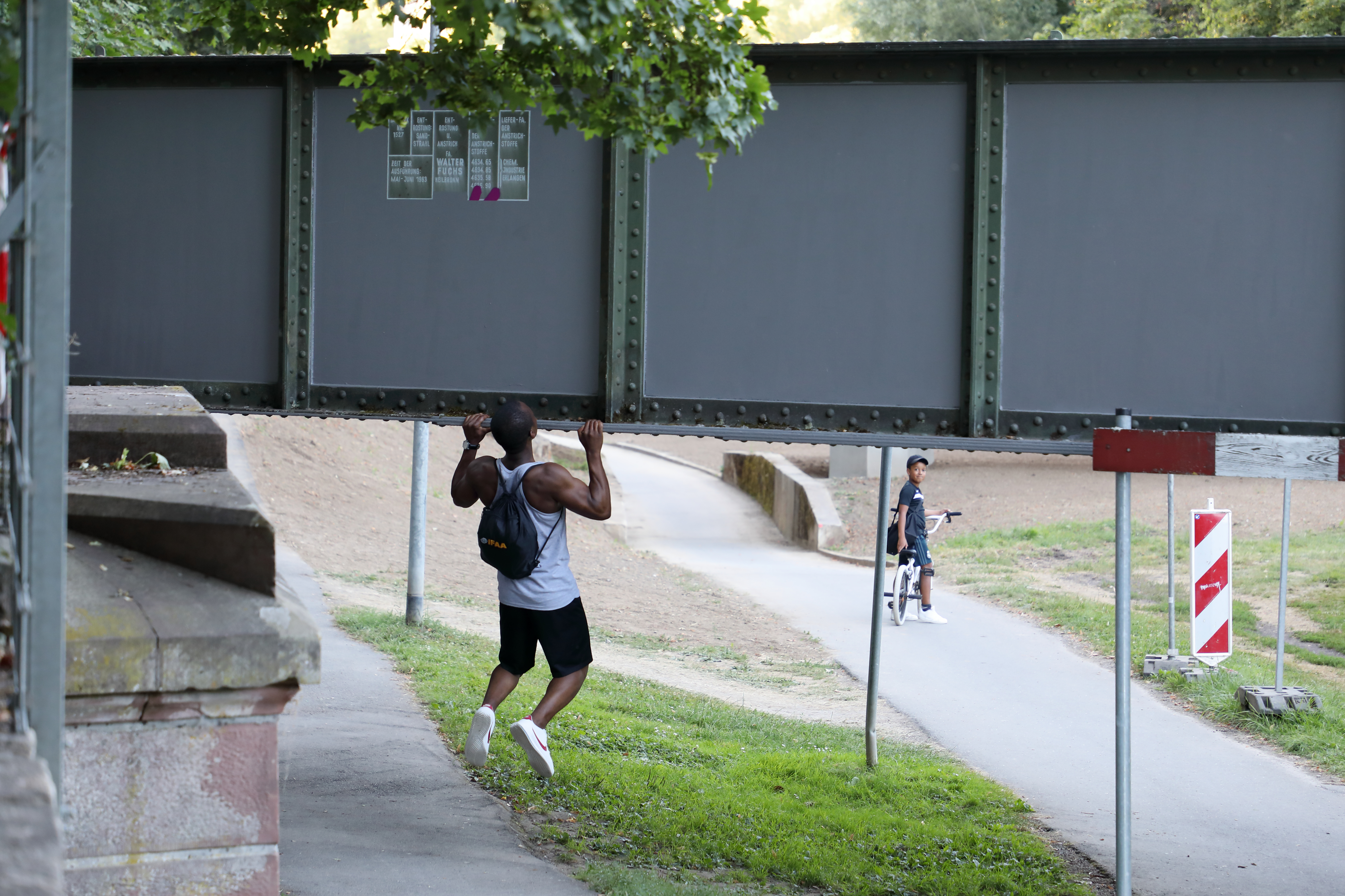 Die Eisenbahnbrücke Bad Mergentheim überquert zwischen dem Schlosspark und dem Kurpark die Tauber. Wegen ihrer geringen Höhe kann sie auch als Trimm-Dich-Gerät dienen.